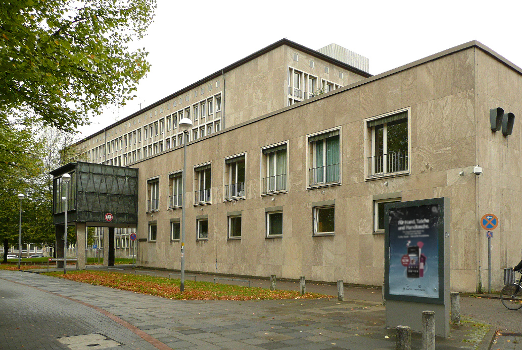 Innenministerium Niedersachsen